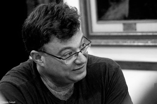 גולן שחר